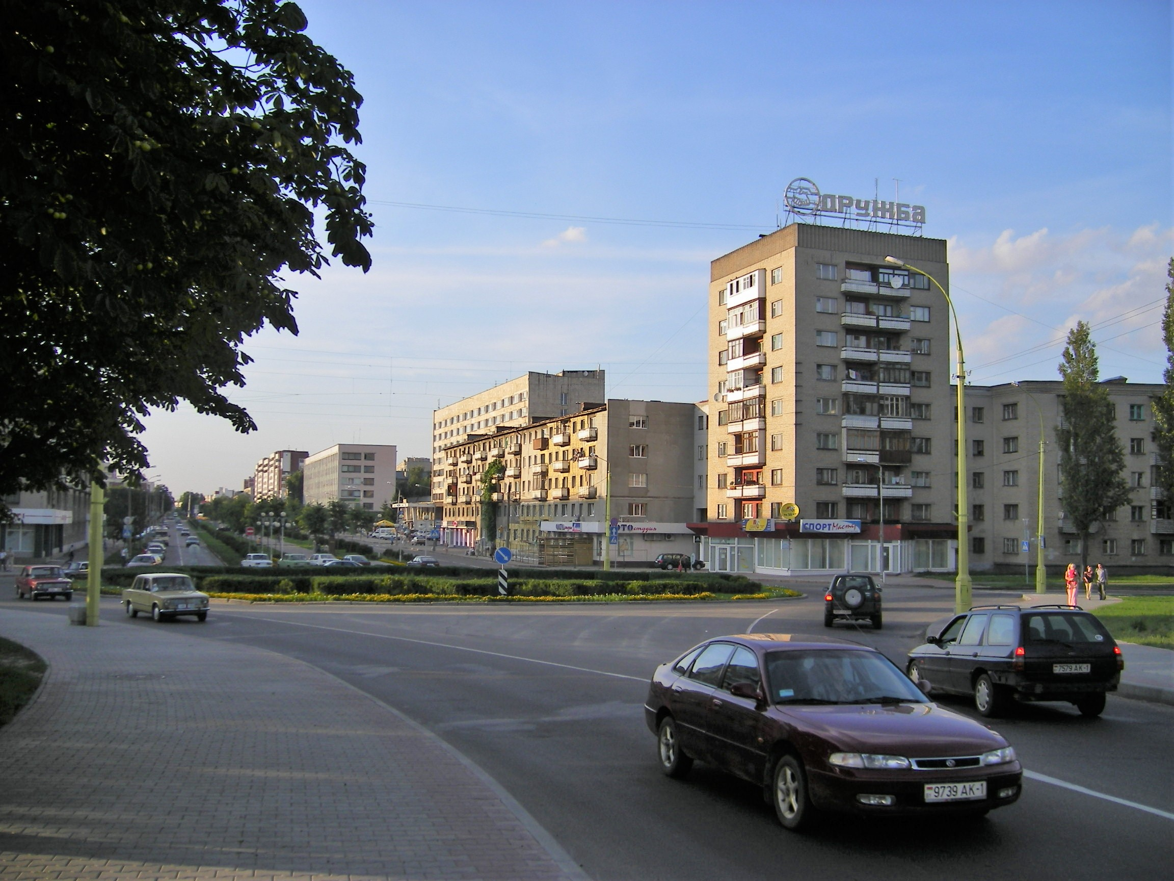 Brest, Bul. Kosmonavtov